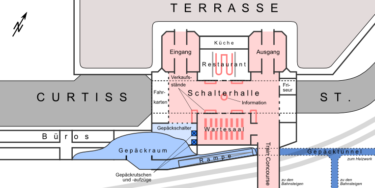 Karte vom Empfangsgebäude des Buffalo Central Terminal in Buffalo, New York. Die New Yorker Architekten Fellheimer and Wagner legten bei ihrem Entwurf besonderen Wert auf die Trennung der Verkehrsströme von Passagieren (rot), Gepäck (blau) und Lieferverkehr (grau).